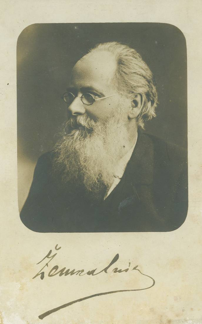 Gabrielius Landsbergis-Žemkalnis (1852 m. lapkričio 2 d. Birželiuose, Pumpėnų valsčius – 1916 m. lapkričio 28 d. Vilniuje, palaidotas Rasų kapinėse) – dramaturgas, publicistas, teatro veikėjas, draudžiamosios lietuviškos spaudos platintojas.